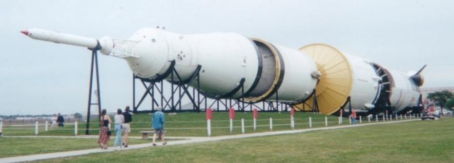 Saturn V Rakete, aufgenommen März 2001, Johnson Space Center Houston